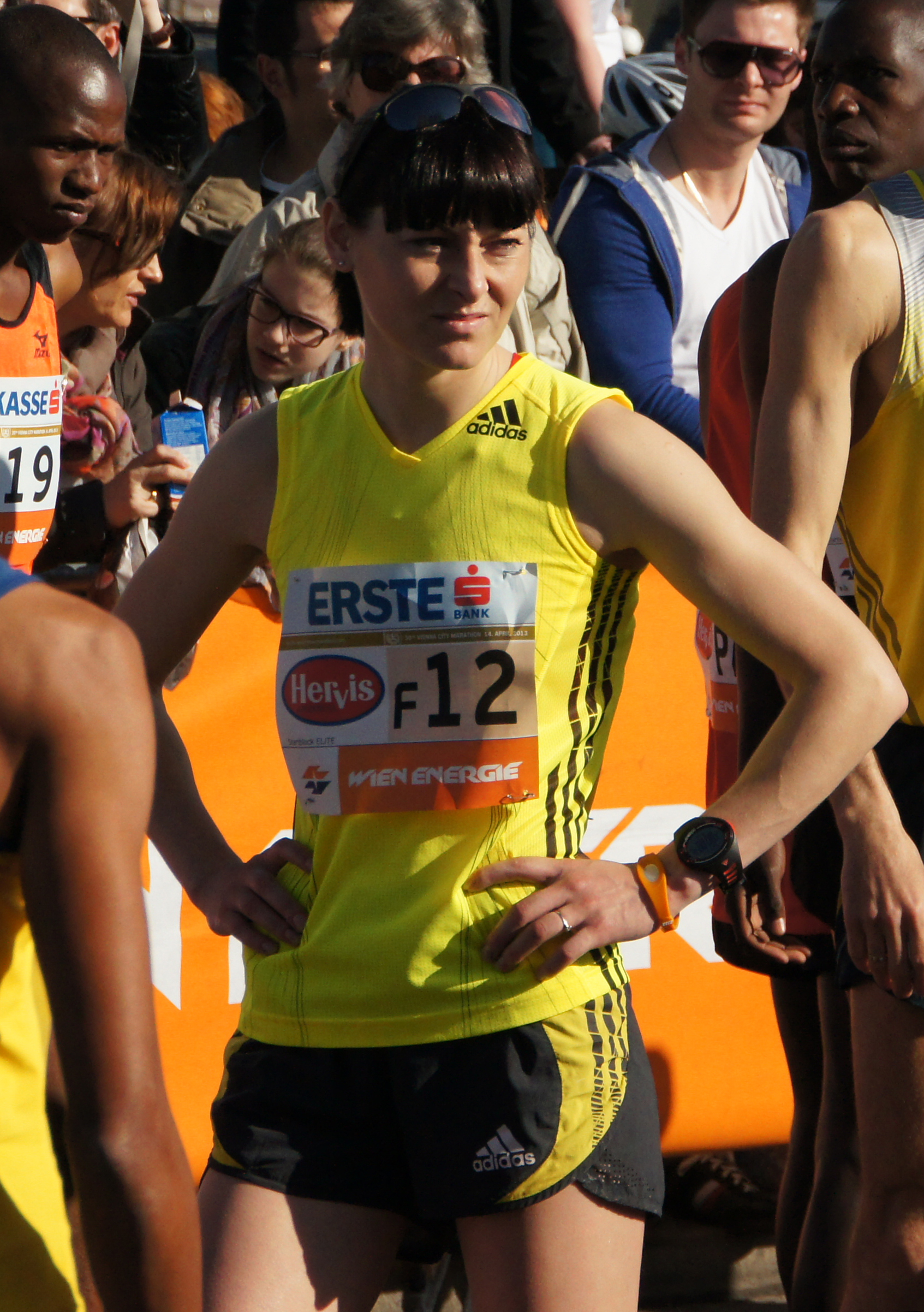 Vienna 2013-04-14 - F12 Paula Todoran, ROM